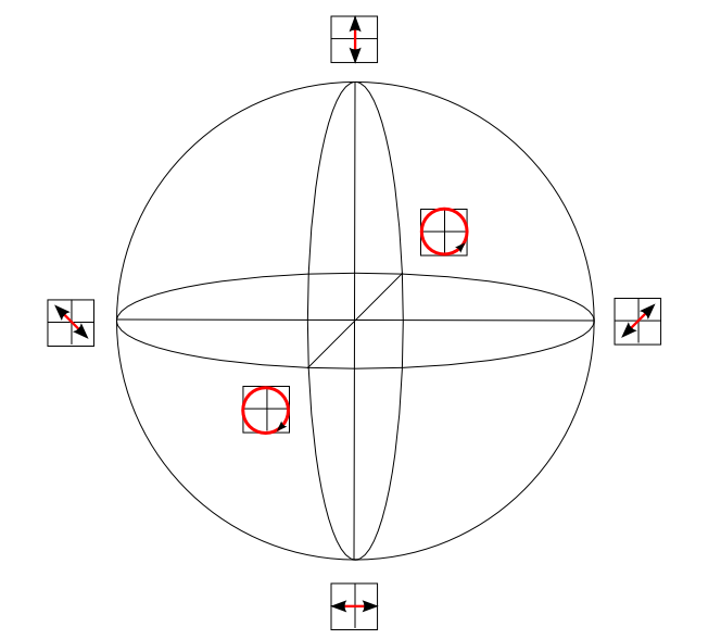 Schematische Darstellund der Blochsphäre für Polarisationszustände